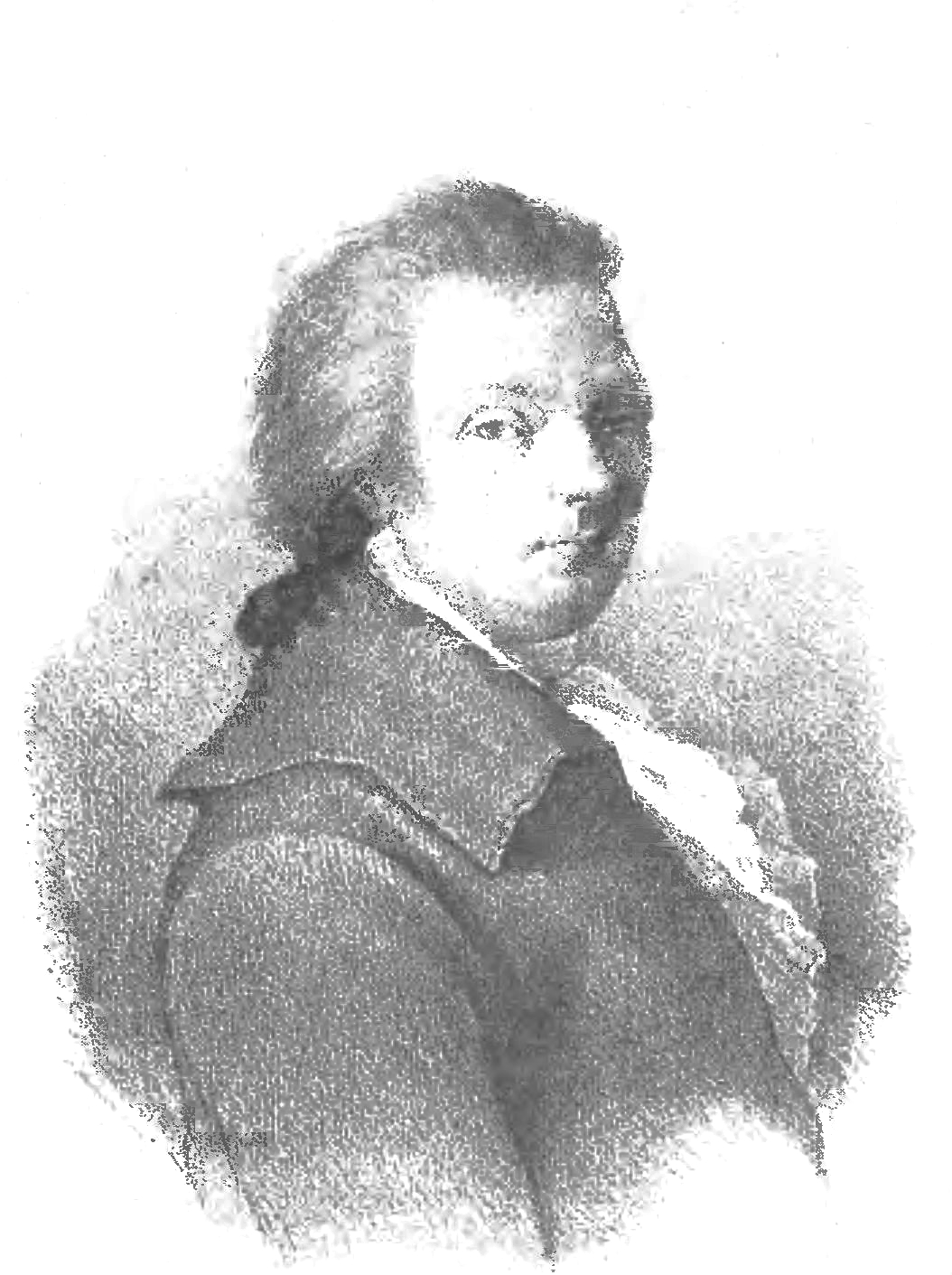 grafika z książki PL - Album biograficzne zasłużonych Polaków wieku XIX t.1 publikacja Marii Chełmońskiej Warszawa 1901